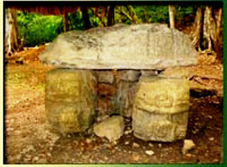 ALTAR DE PIEDRAS NEGRAS, Guatemala